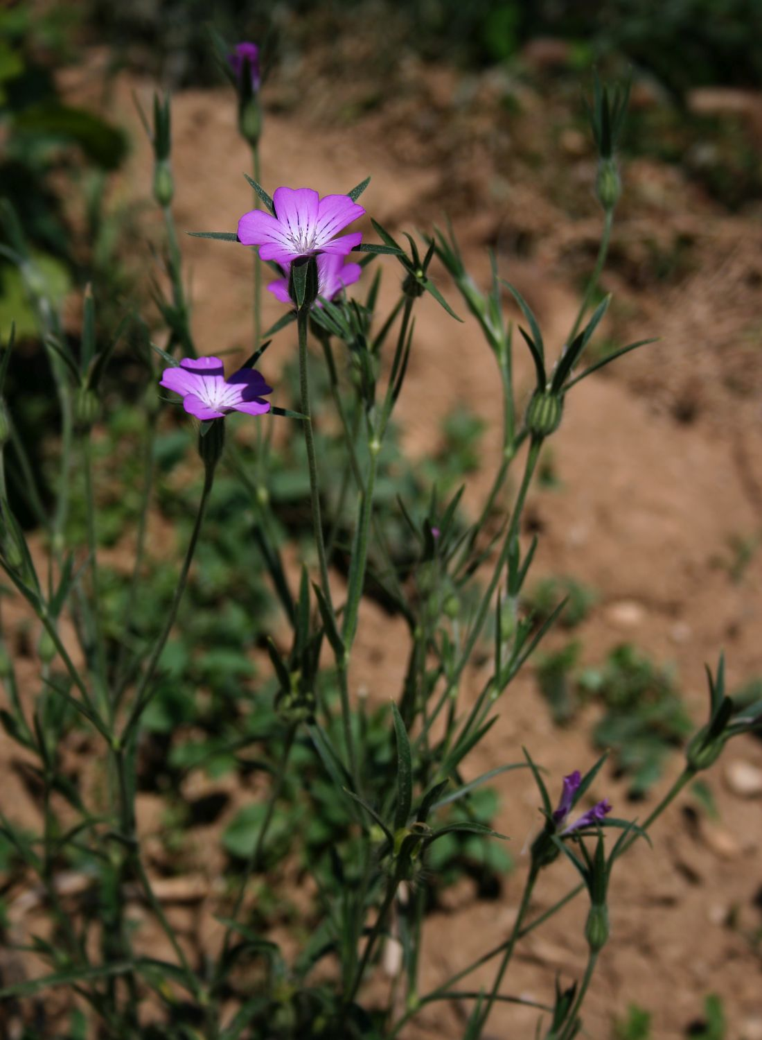 Kornrade (Agrostemma githago), Nelkengewächse (Caryophyllaceae) – Österreich/Austria/Autriche: Niederösterreich, Alpenostrand, SW Gumpoldskirchen